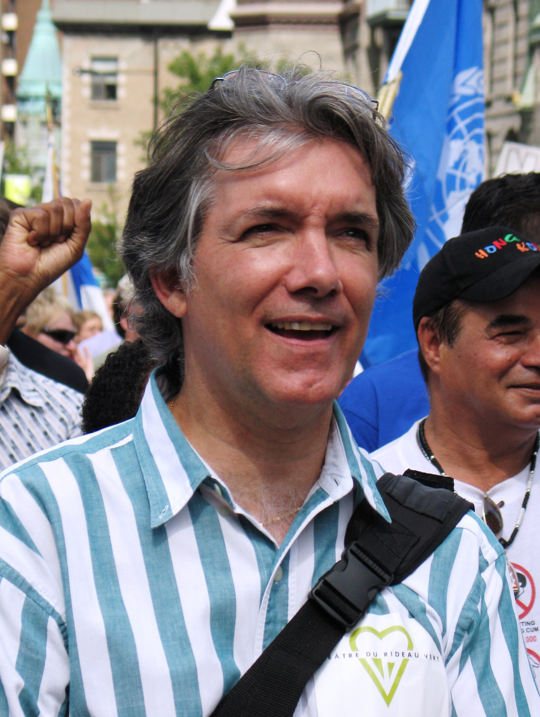 Daniel Turp, ancien député du Bloc québécois (1997-2000) et député du Parti québécois (2003 - 2008), participant à une manifestation à Montréal pour commémorer les 30 ans de la Charte de la langue française.